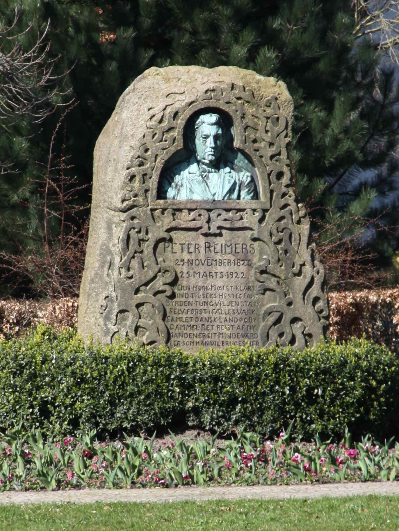 Denkmal von Peter Reimers: 1926 wurde ein Gedenkstein am Løkken in Sønderborg mit einem Relief von Niels Hansen Jacobsen errichtet. Das Porträt stammt von Aase Kramp (Folkehjem, Aabenraa).